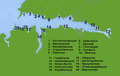 Севастопольські бухти основного рейду